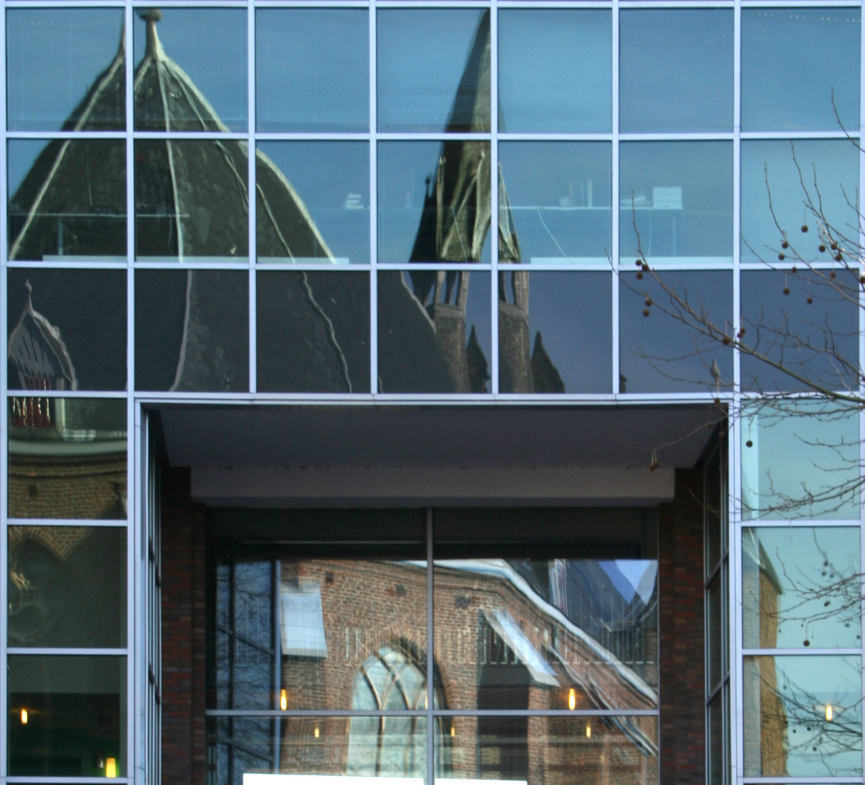 Reflectie van de Mariënburgkapel te Nijmegen in een nabijgelegen modern pand